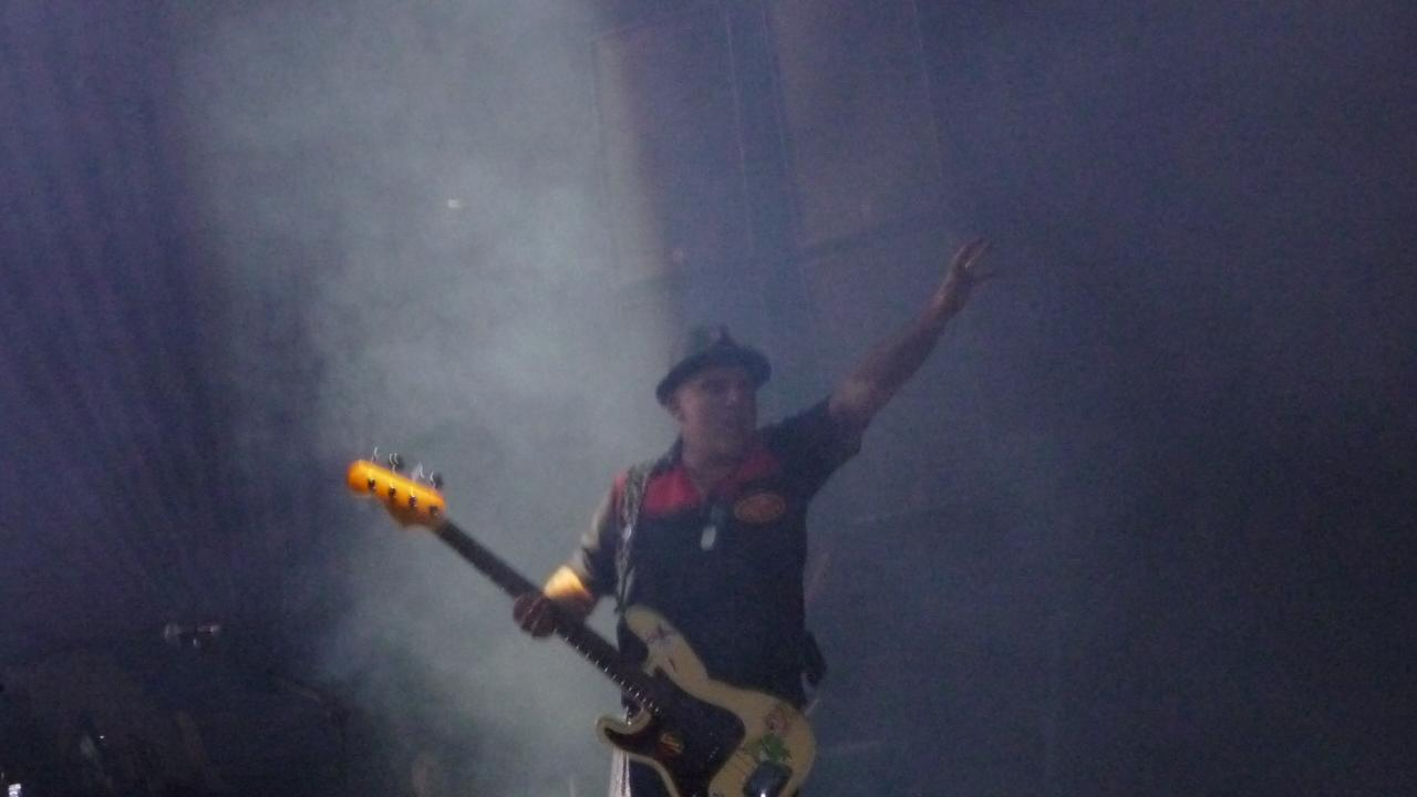 Flavio Cianciarulo en Bogotá (2009).